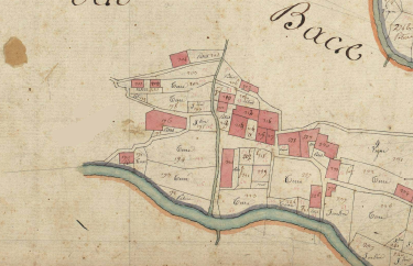 Vellans en el Cadastre napoleònic del 1812 (Arxius Departamentals dels Pirineus Orientals)